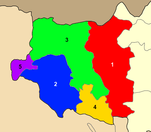 Χάρτης των ενοτήτων (και πρώην δήμων) από τις οποίες αποτελείται ο Δήμος Παιονίας